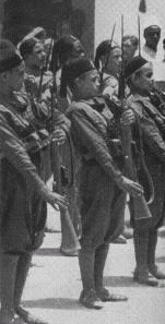 GAL unit in uniforms